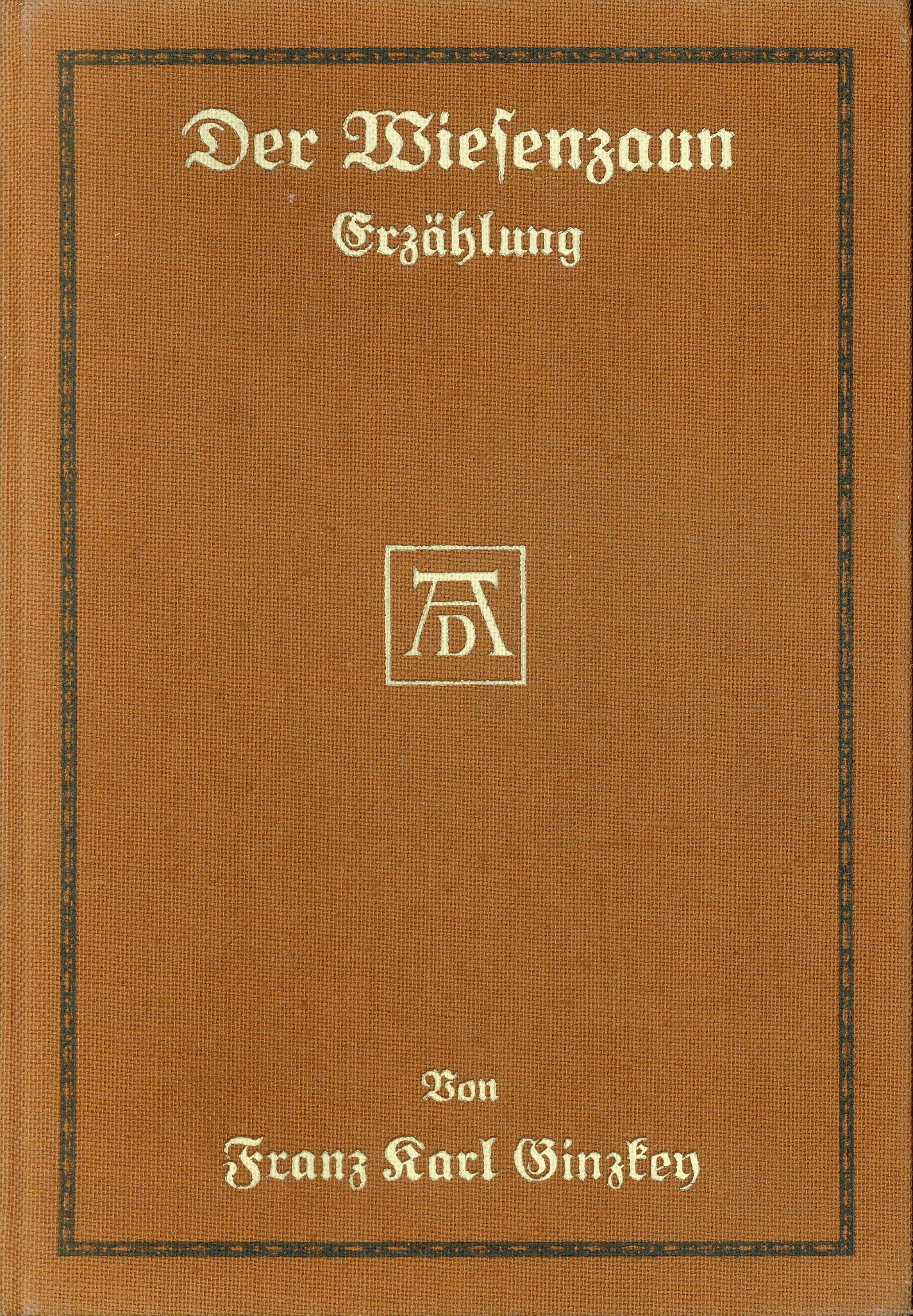 Franz Karl Ginzkey: Der Wiesenzaun. Erzählung. L. Staackmann Verlag, Leipzig 1913